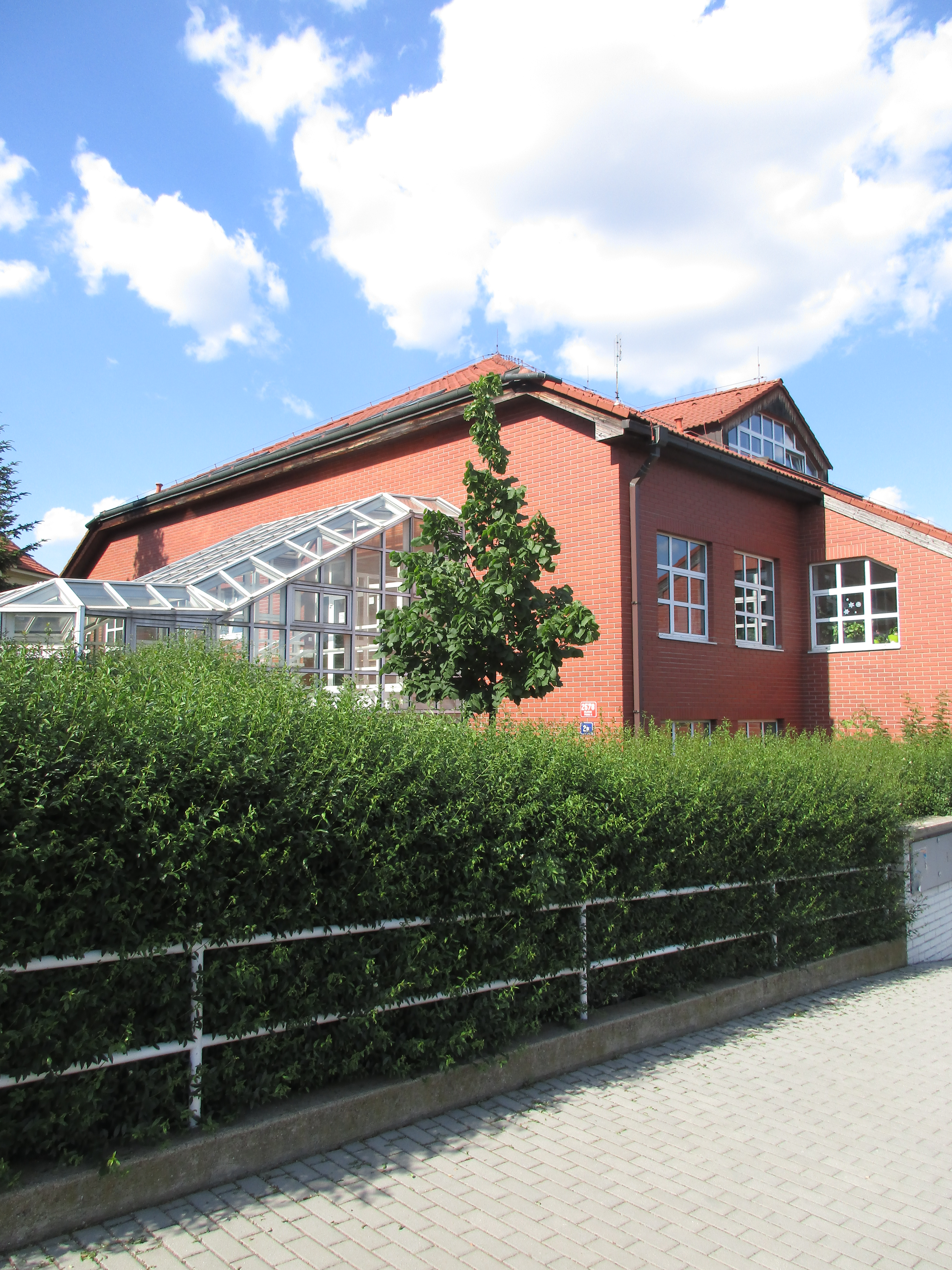 Lípa republiky. Praha 6 - Dejvice, Na Hanspaulce. Vysazena roku 2018 na památku 100. výročí vzniku Československé republiky.